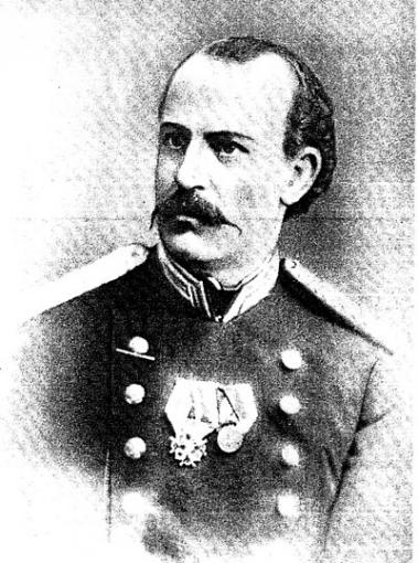 Микола Миколайович Аркас (старший)